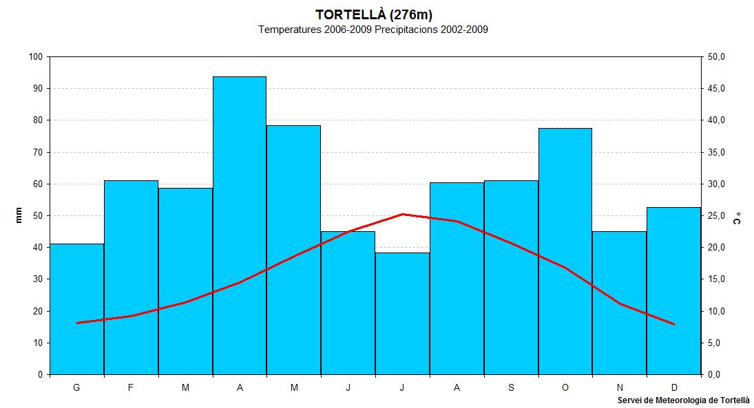 Climograma de Tortellà 2008